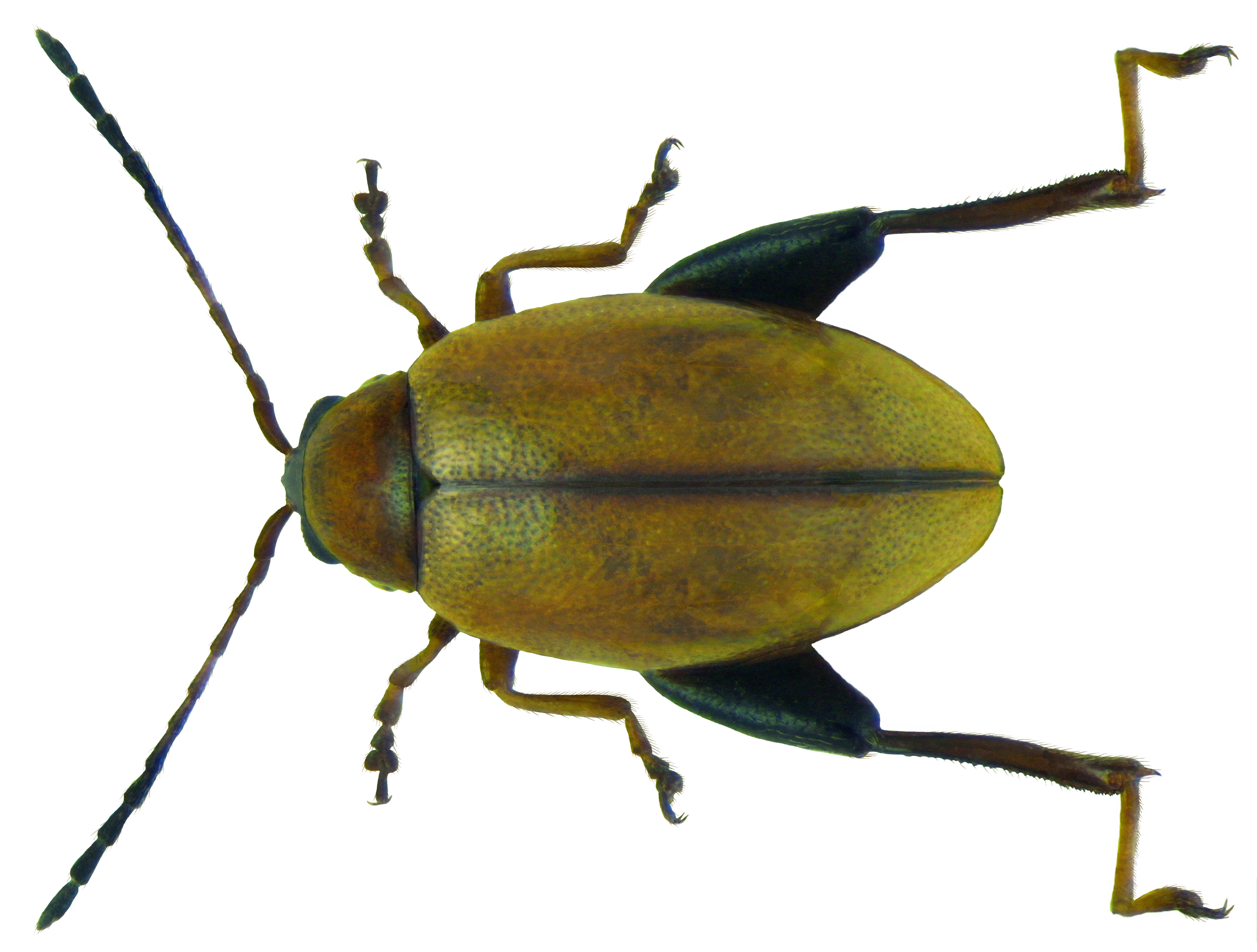 Longitarsus melanocephalus (Geer, 1775) female Familie: Chrysomelidae Groesse: 2,9-3,0 mm Verbreitung: Palaearktis Oekologie: an Plantago-Arten Fundort: Germania, Bayern, Oberfranken, Selbitz leg. det. U.Schmidt, 2003 Photo: U.Schmidt, 2011